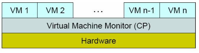 Darstellung der VM der IBM VM/370 von 1979 Arquitectura de máquina virtual, virtual machine architecture